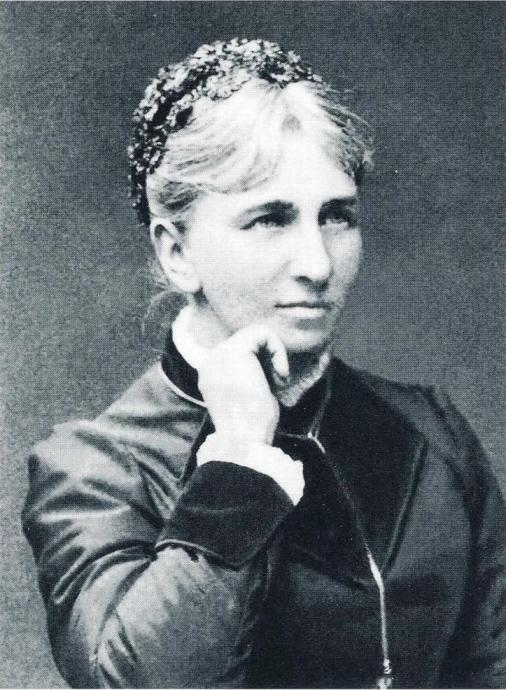 Kulttuurivaikuttaja Elisabeth Järnefelt (1839–1929).